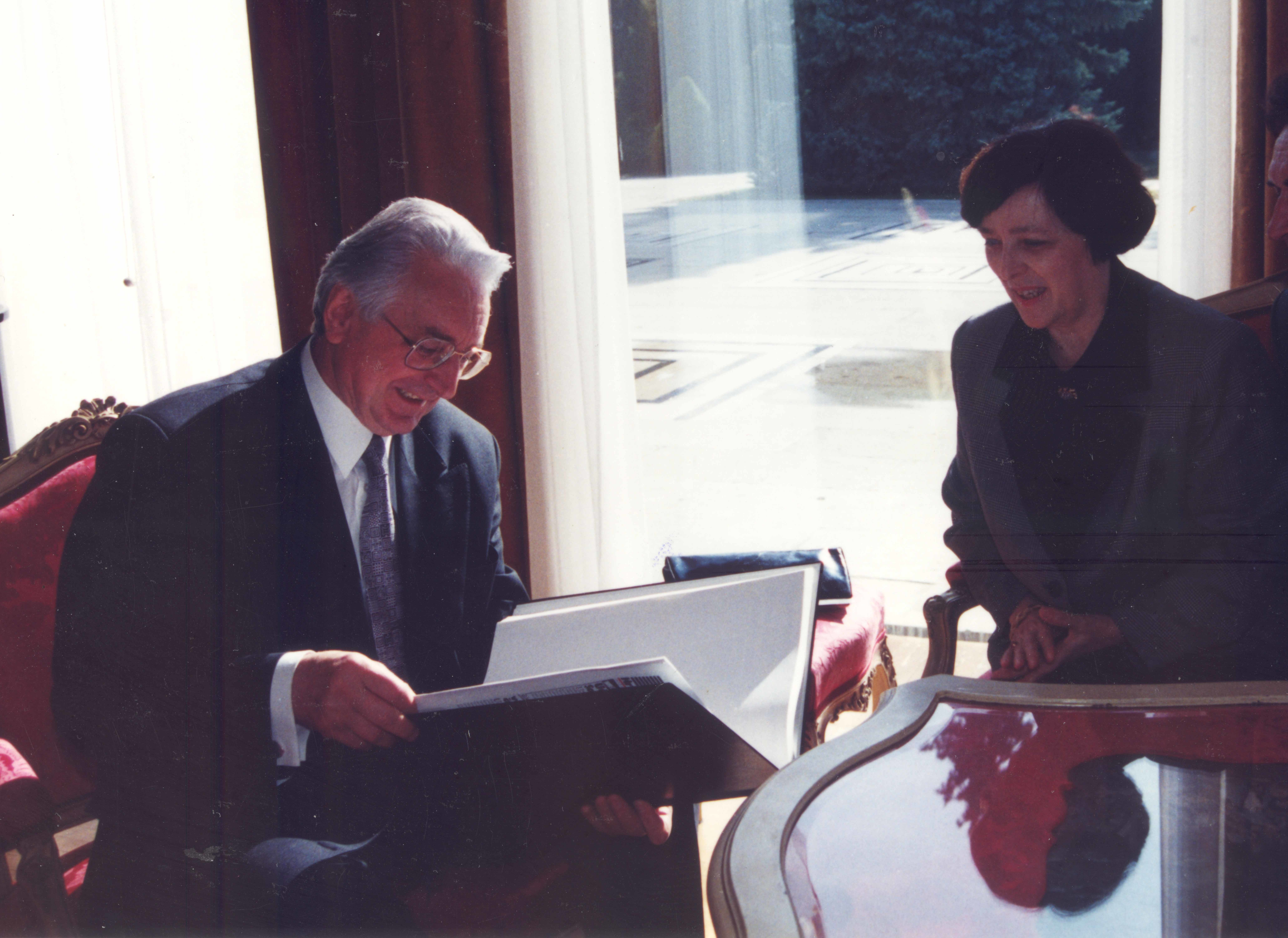 Predsjednik Franjo Tuđman i Ana Havel, glavna urednica Hrvatske riječi